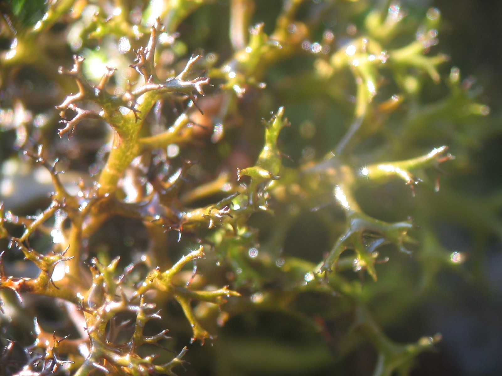 Fotografía realizada por Pablo Alberto Salguero Quiles a un ejemplar de 5cm. de altura de Cetraria aculeata en la zona centro de la Península Ibérica. Valle del río Lozoya, Madrid. España.